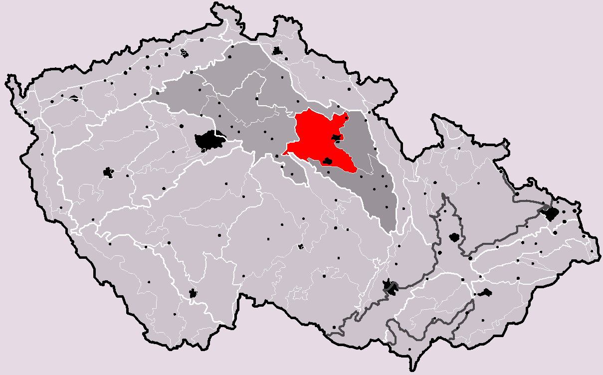 Poloha geomorfologického celku Východolabská tabule v rámci České republiky. Hercynský systém Hercynská pohoří I Česká vysočina I6 (VI) Česká tabule I6C (VIC) Východočeská tabule I6C-1 (VIC-1) Východolabská tabule